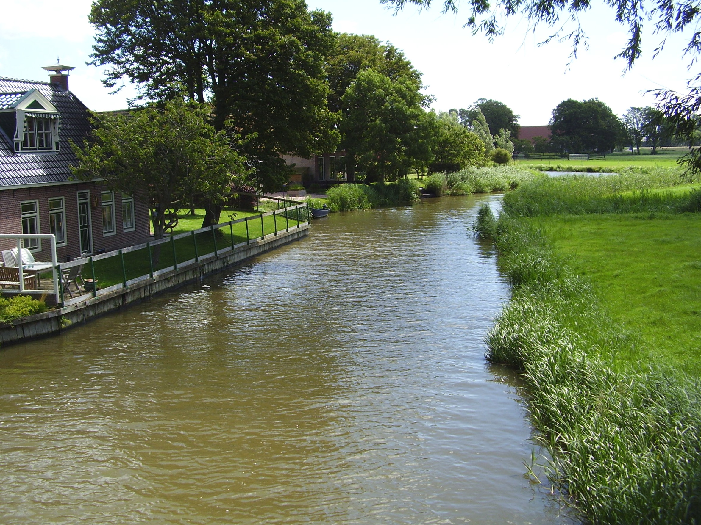 De Harlingervaart bij Grauwe Kat in Friesland